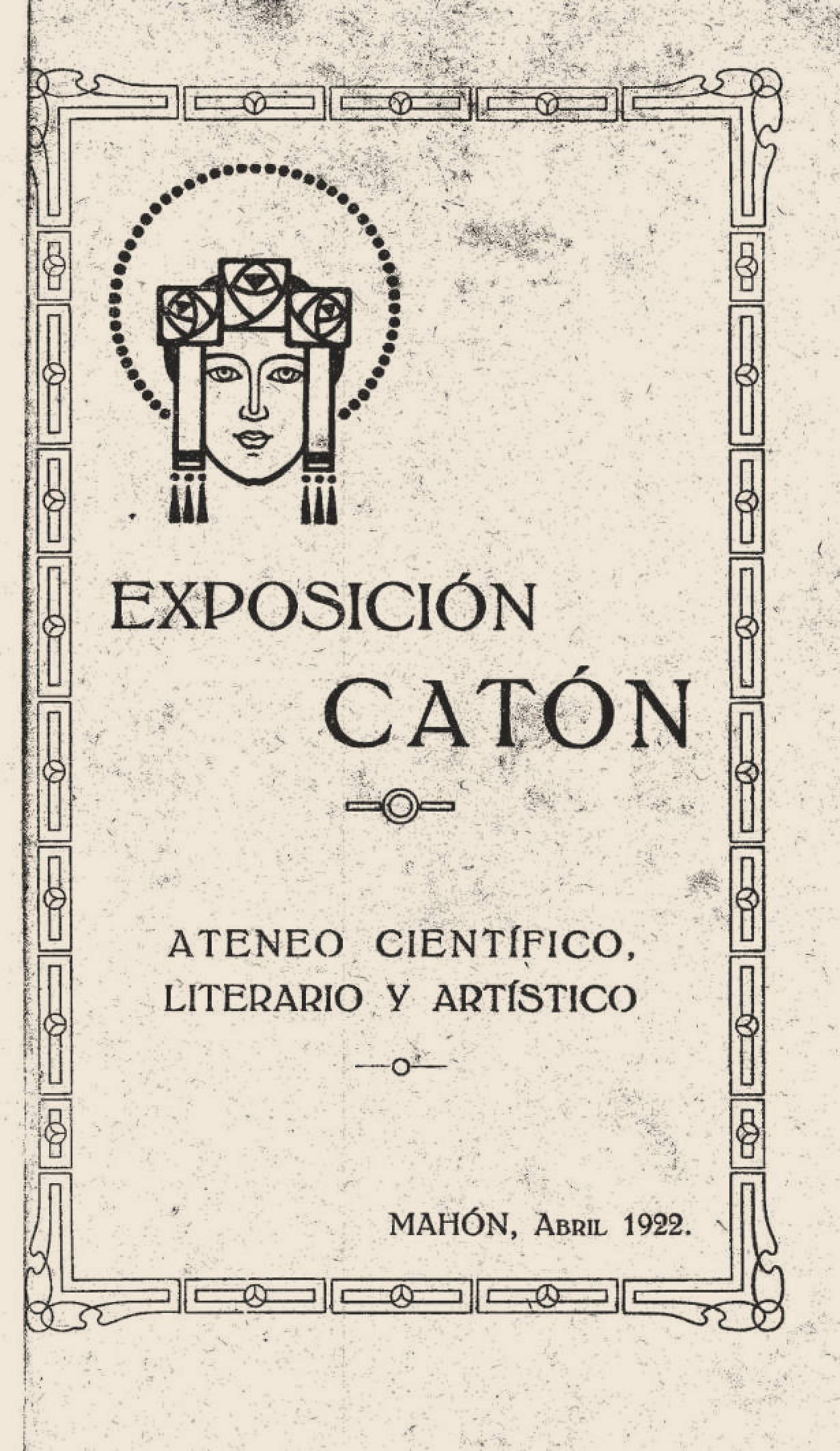 Catálogo de la exposición de dibujos y pinturas de Catón celebrada en el salón de actos del Ateneo Científico, Literario y Artístico de Mahón del 29 de abril al 2 de mayo de 1922. p. 1. Reproducida en — (1 dic. 1922). Revista de Menorca (Ateneo Científico, Literario y Artístico de Mahón). XVII (XII): 41.